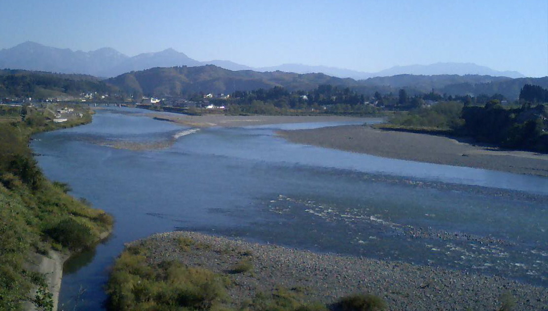 この写真は2006年11月08日新潟県川口町において投稿者本人によって撮影されました。写っているものは魚野川と信濃川の合流点です。北側から南向きに撮影された写真なので、左上側が魚野川、右上から流れこみ右下へ流れていく川が信濃川です。(右上の信濃川が か細く観えるのは、JR東日本信濃川発電所の影響と言われています。私が左右反転させた訳では有りません。)